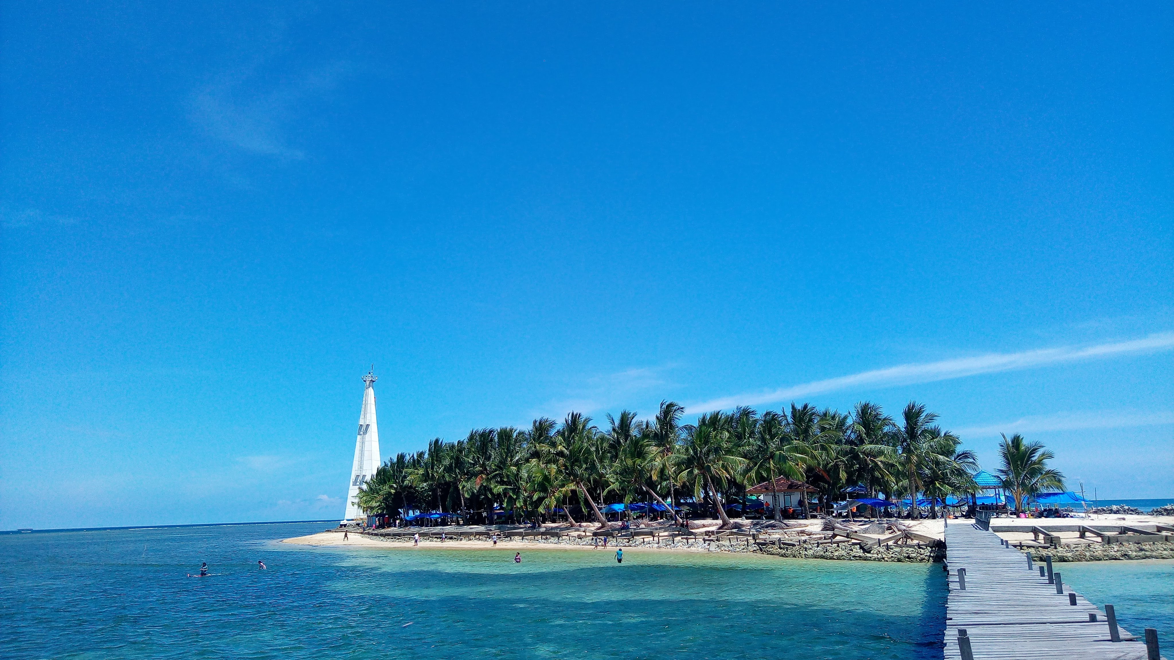 Pulau Beras Basah March 2018